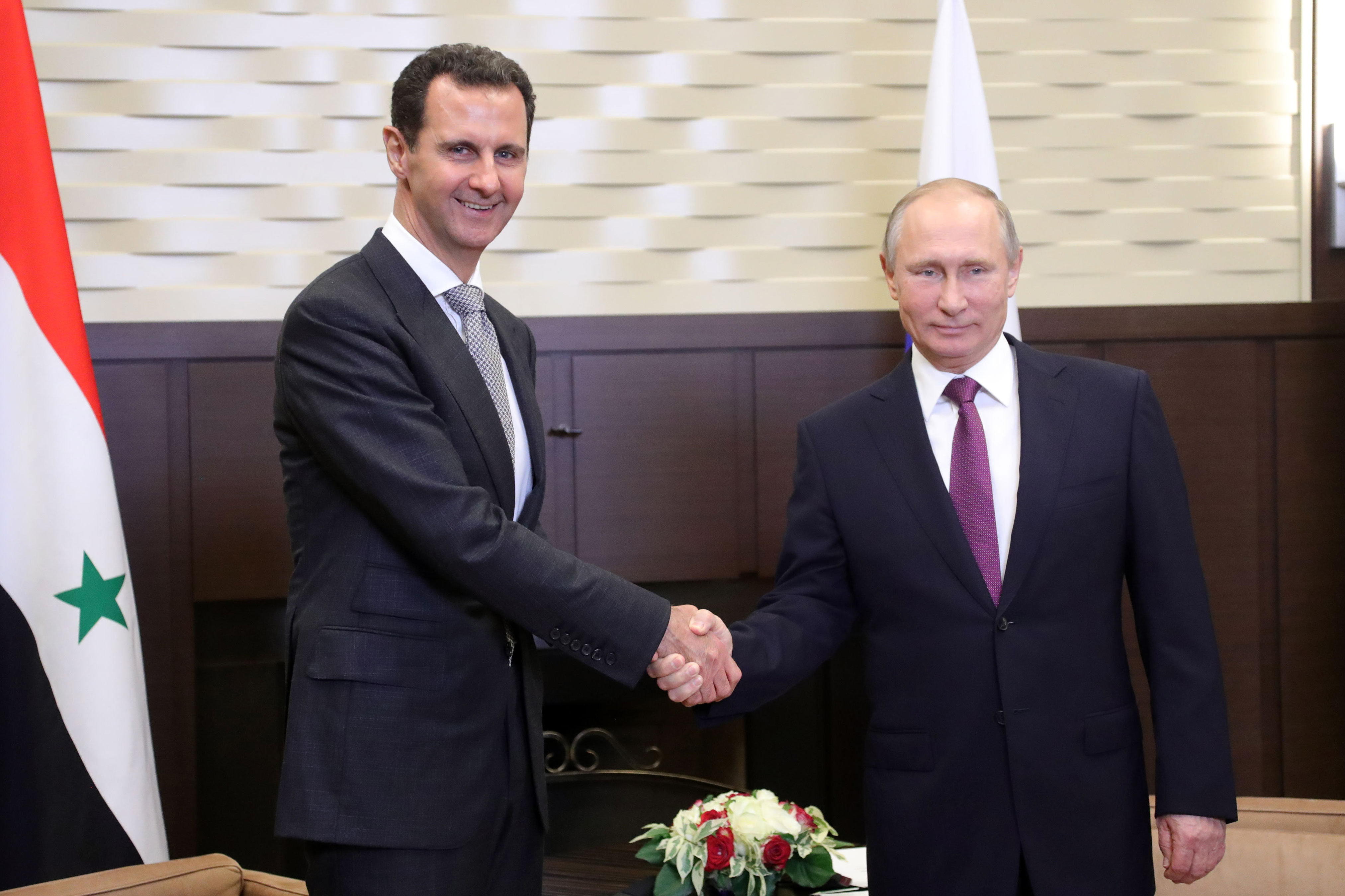 Президент России Владимир Путин с Президентом Сирийской Арабской Республики Башаром Асадом